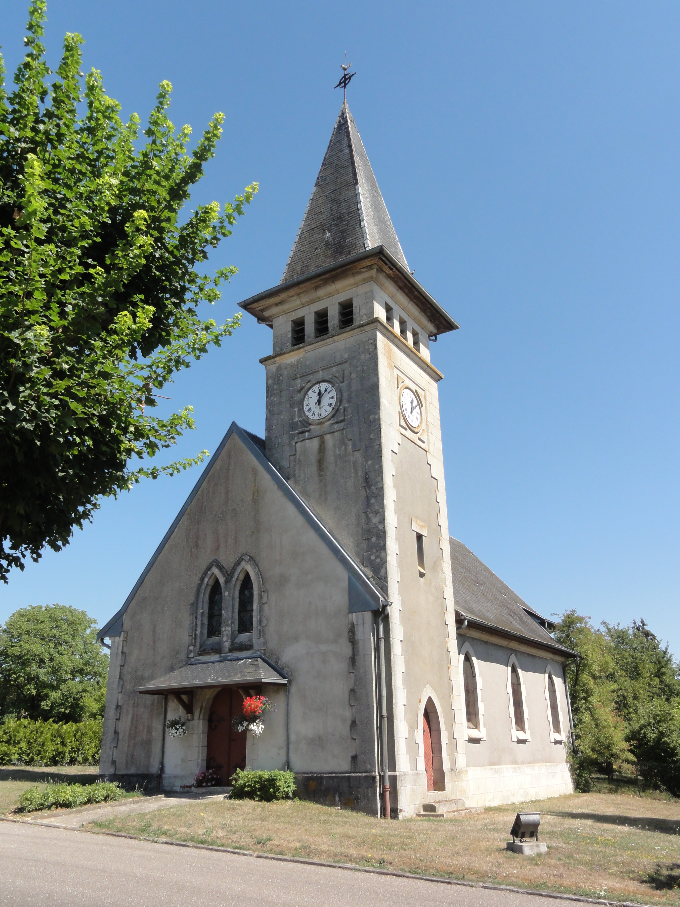 Béthincourt (Meuse) église